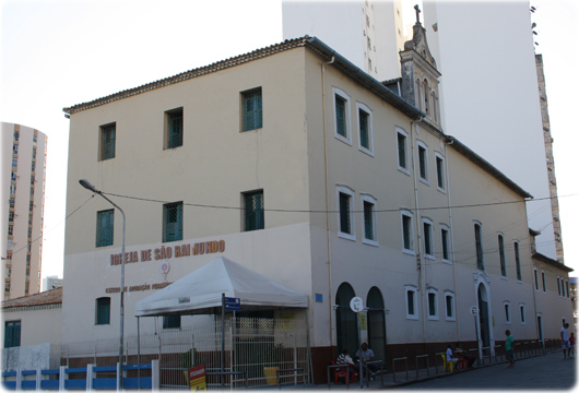 igreja do sec XVII em salvador bahia